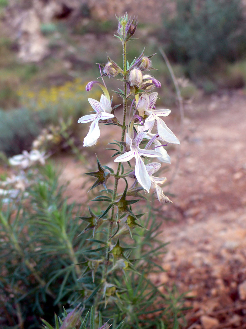 Teucrium pseudochamaepitys en el Parque Natural de la Sierra de la Muela de Cartagena (Spain)